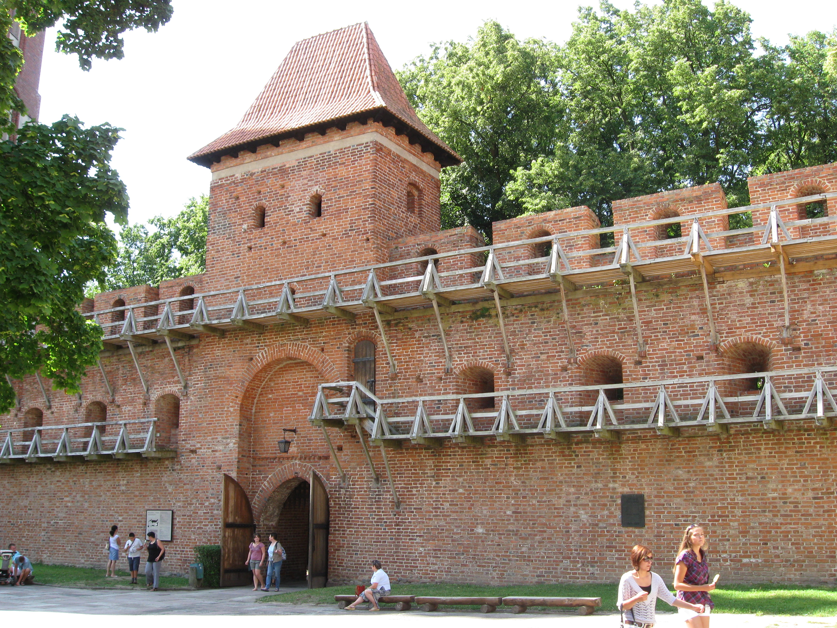 Frombork - Brama Zachodnia w zespole katedralnym od strony dziedzińca (zabytek nr rejestr. A/476)